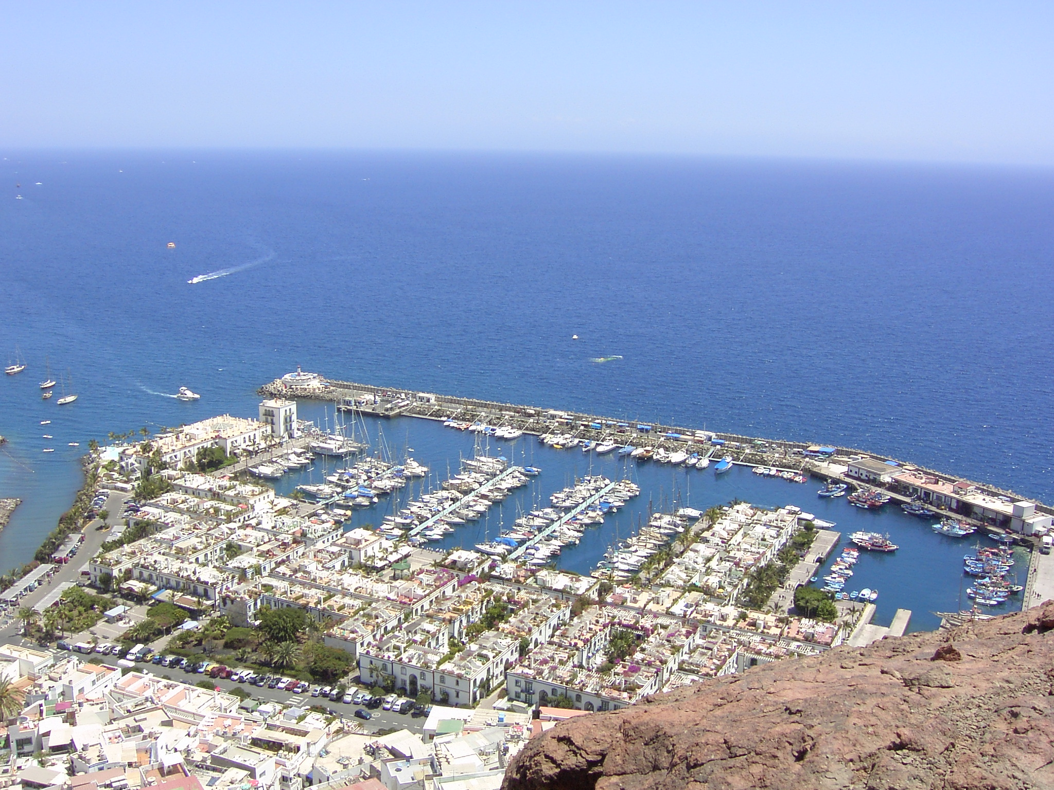 Beschreibung:Puerto de Mogán (Gran Canaria) Quelle: Fotograf / Zeichner: Carsten Geßner Andere Versionen: (für die GNU FDL) (für Public Domain)